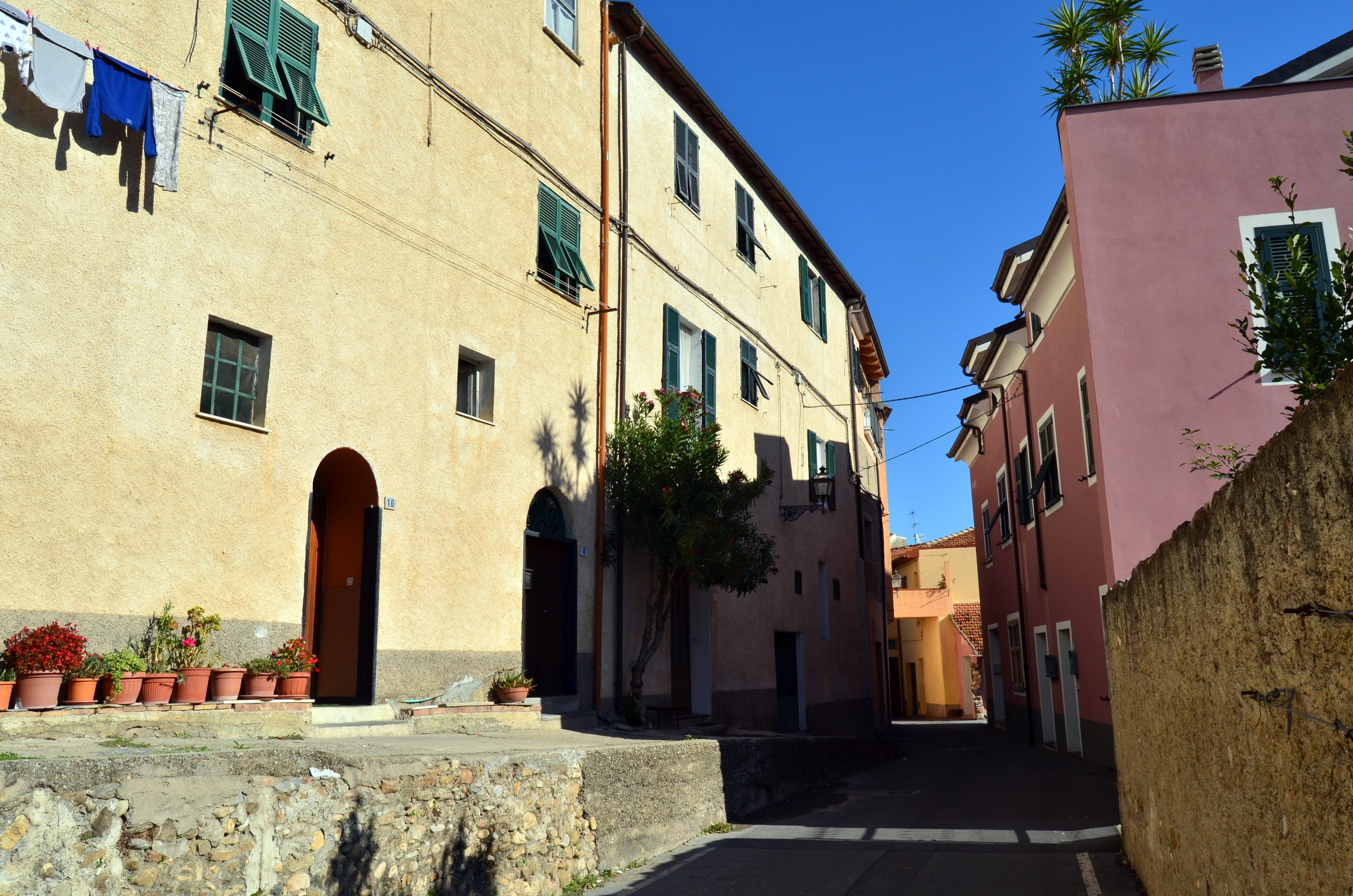 Centro storico di Bastia, Albenga, Liguria, Italia